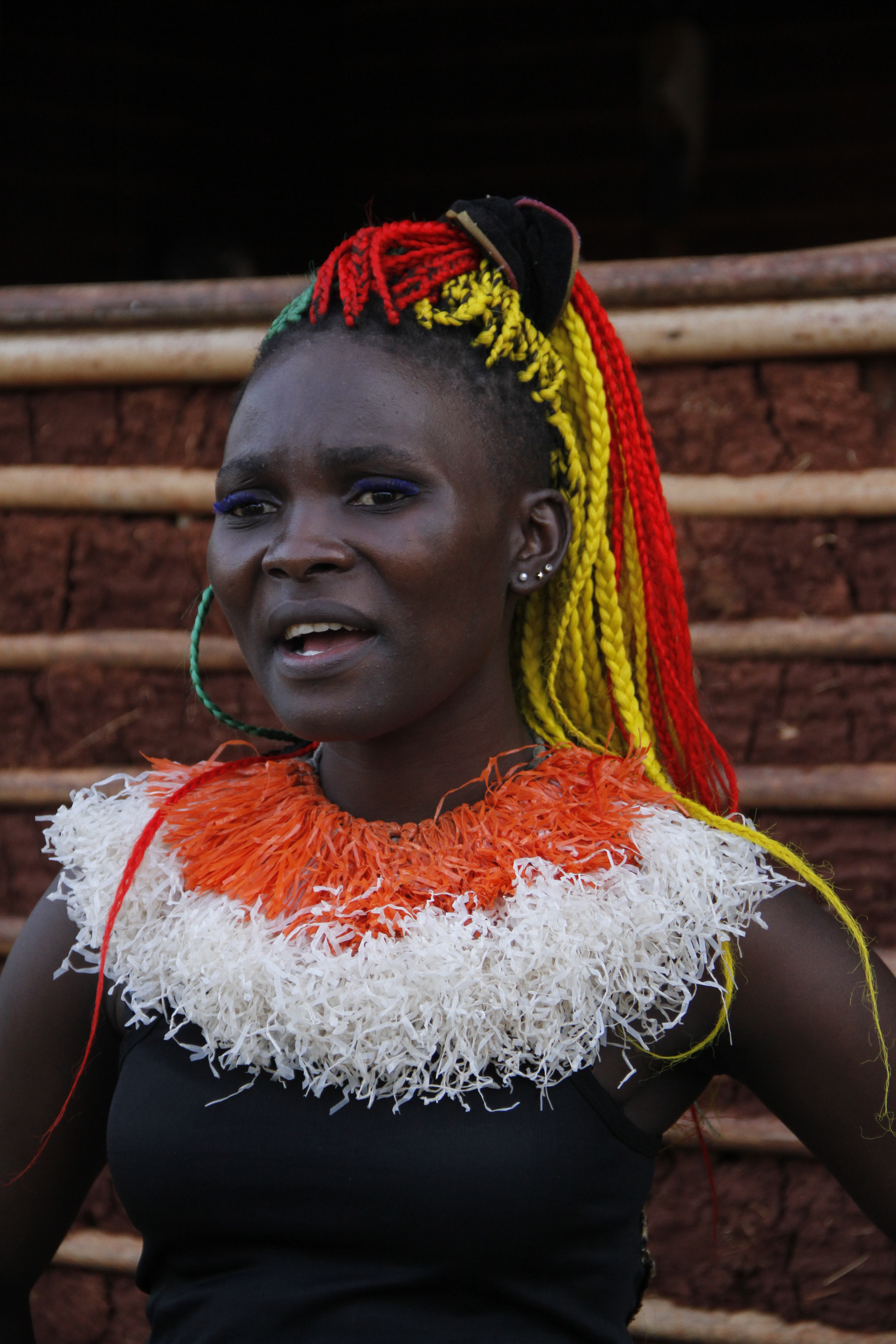 Danseuse avec des accessoires de danse lors du Fenac (Festival National des Arts et de la Culture) à Yaoundé au Cameroun This is an image from Cameroon